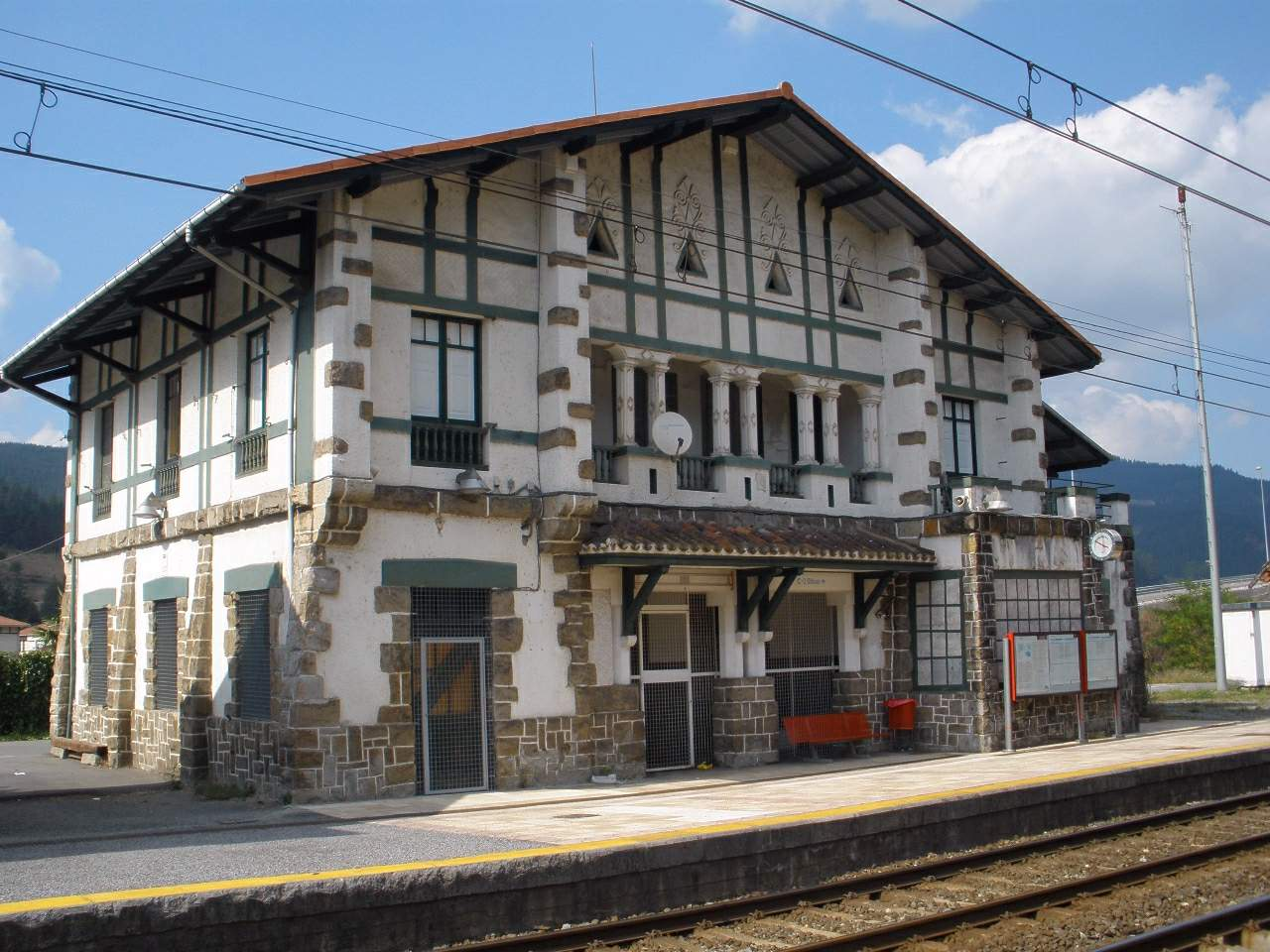 Estación de tren de Luyando (Álava).